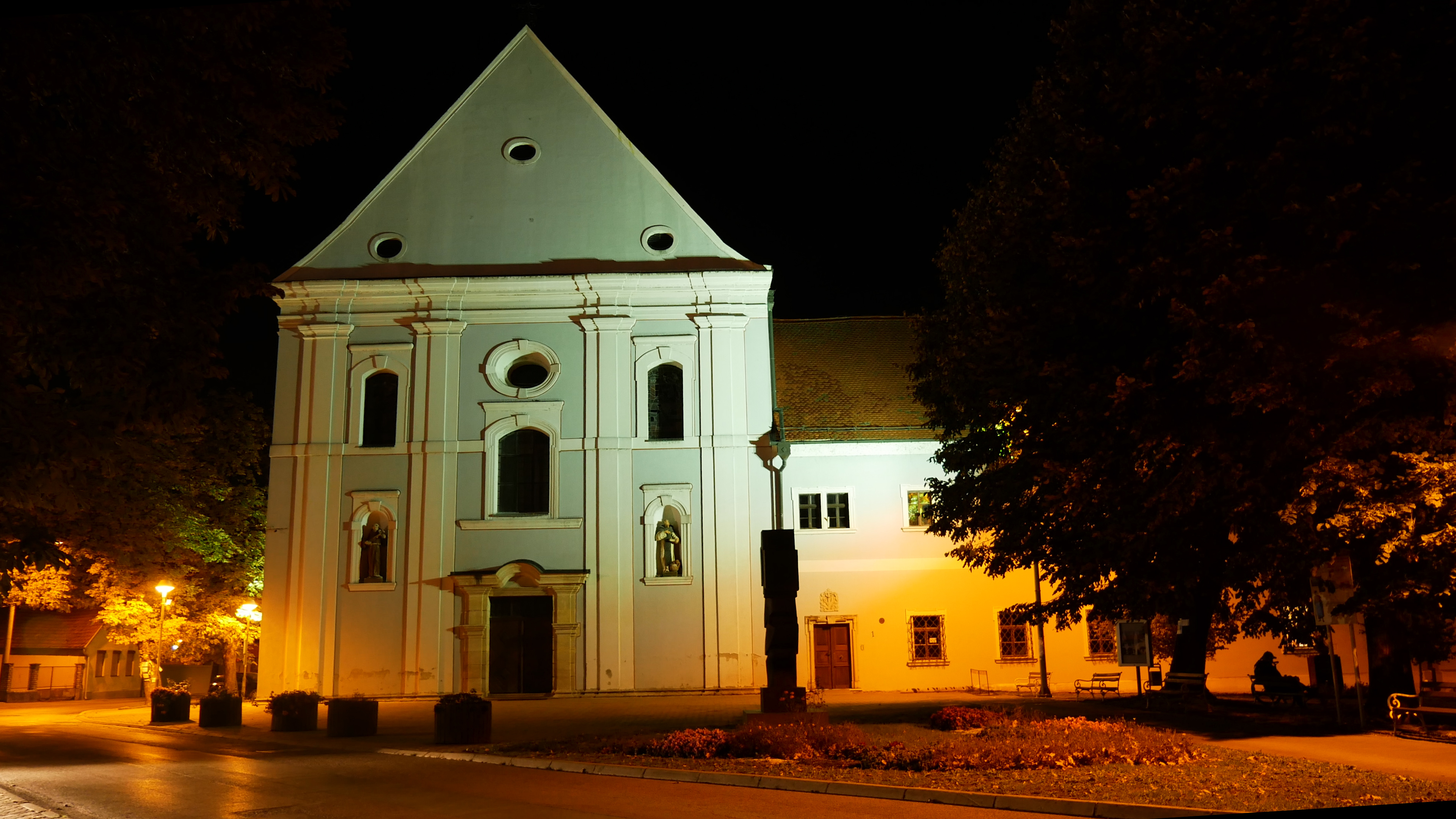 Pročelje samostana u noći